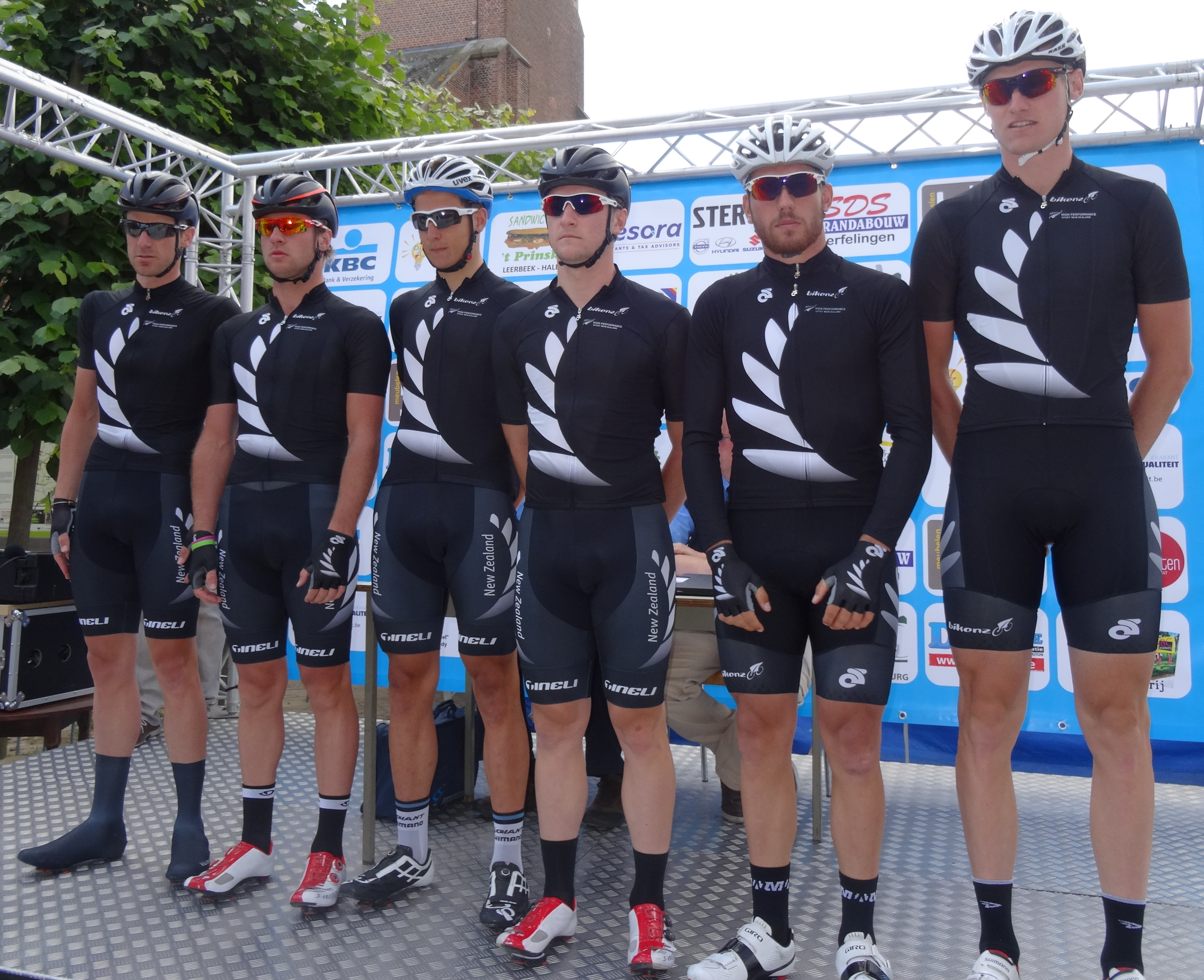 Reportage photographique réalisé le mercredi 25 juin à l'occasion du départ et de l'arrivée de l'Internationale Wielertrofee Jong Maar Moedig 2014 à Oetingen (Gooik), Belgique.